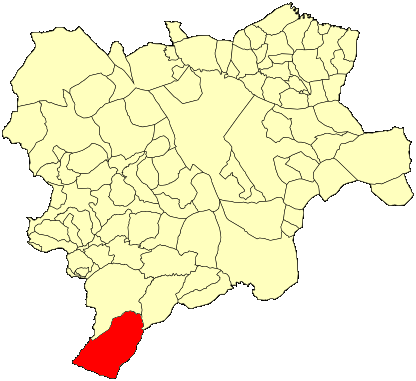 Mapa municipal de Albacete con el municipio de Nerpio resaltado en rojo.